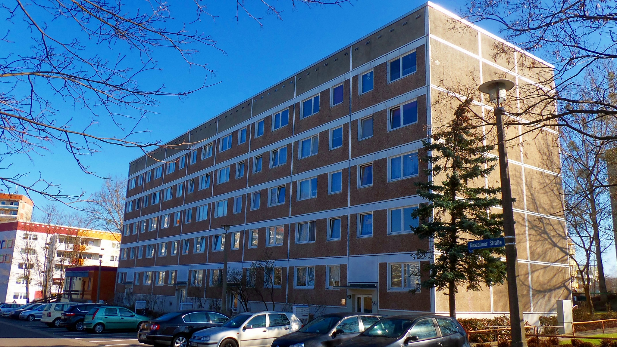 1. WBS 70 Block der DDR in Neubrandenburg; Eingangsseite, errichtet 1973